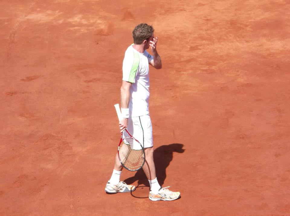 Filippo Volandri en el ATP de Viña del Mar 2012.